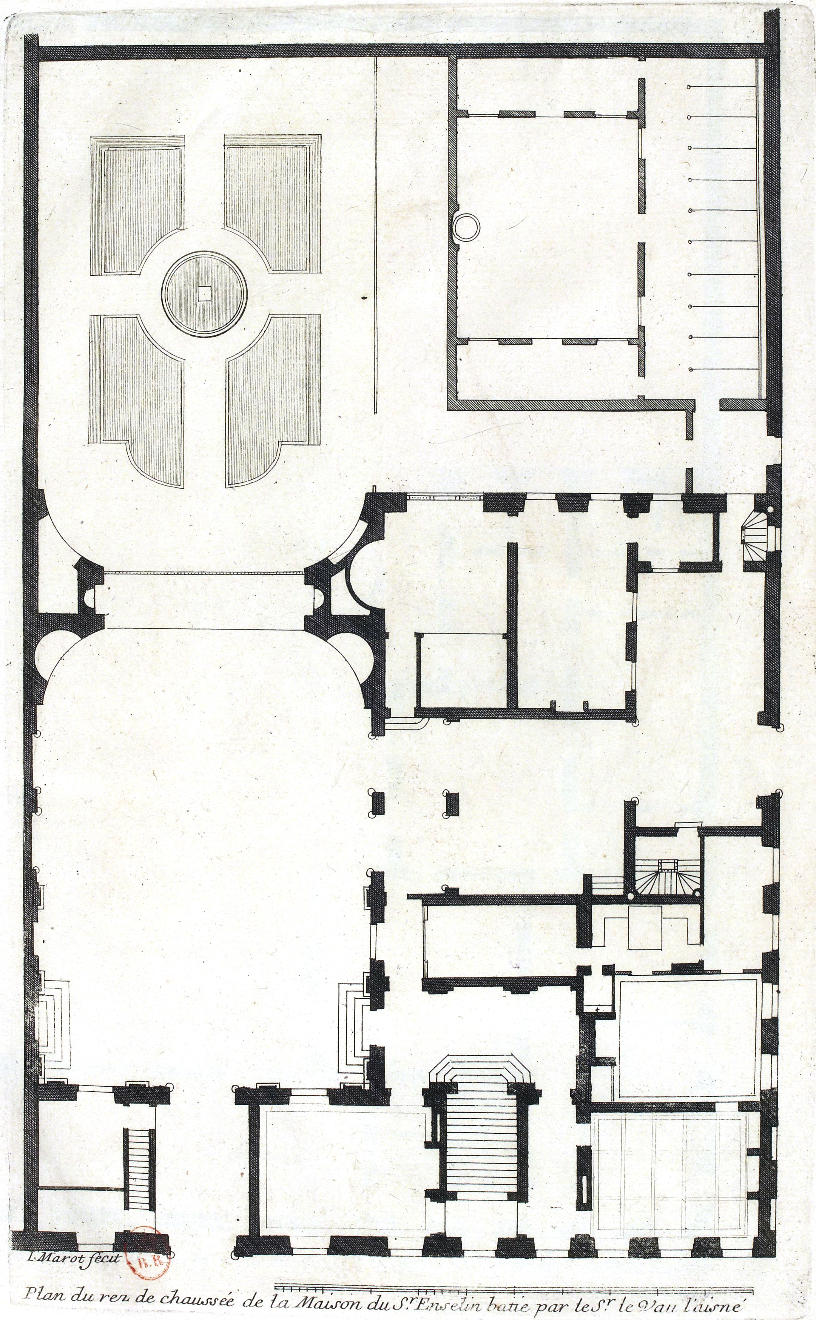 Plate from Jean Marot's L'Architecture française